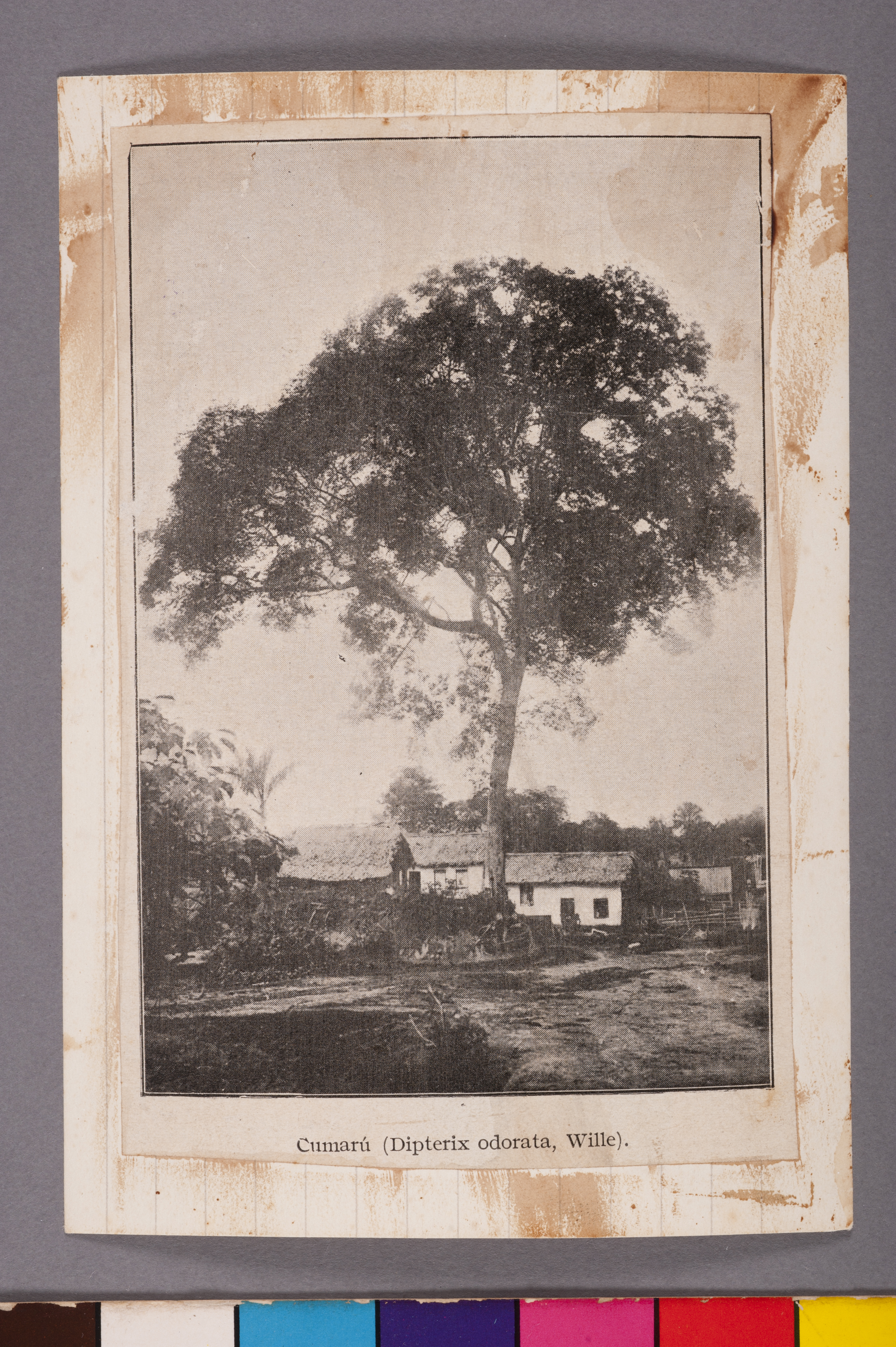 Obra que integra o acervo do Museu Paulista da USP. Coleção João Baptista de Campos Aguirra.